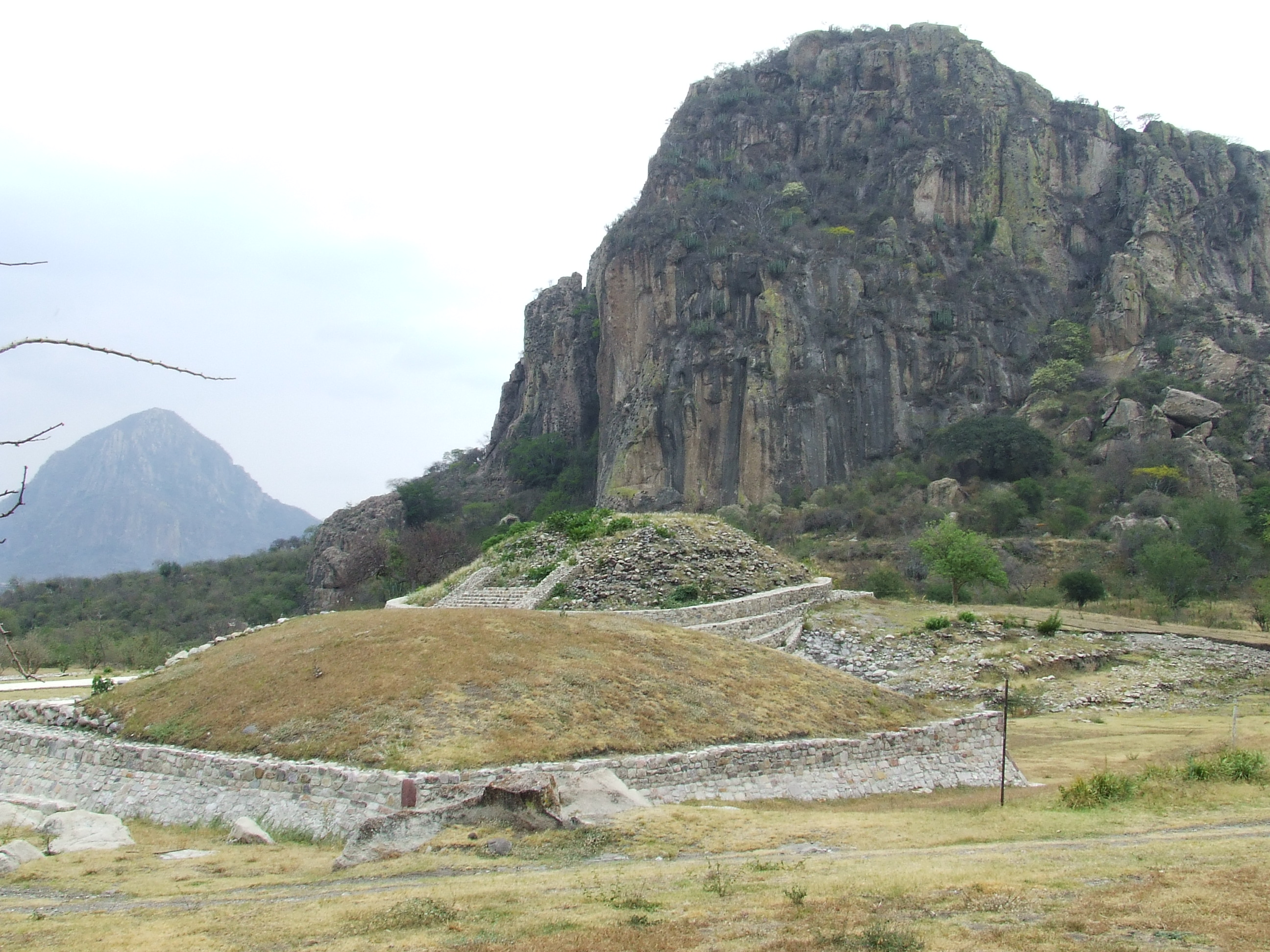 Zona arqueológica de Chalcatzingo